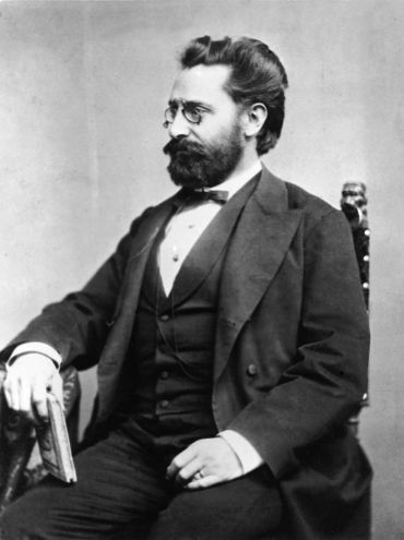 Ponori Thewrewk Emil, Ókor kutató (1838–1917)